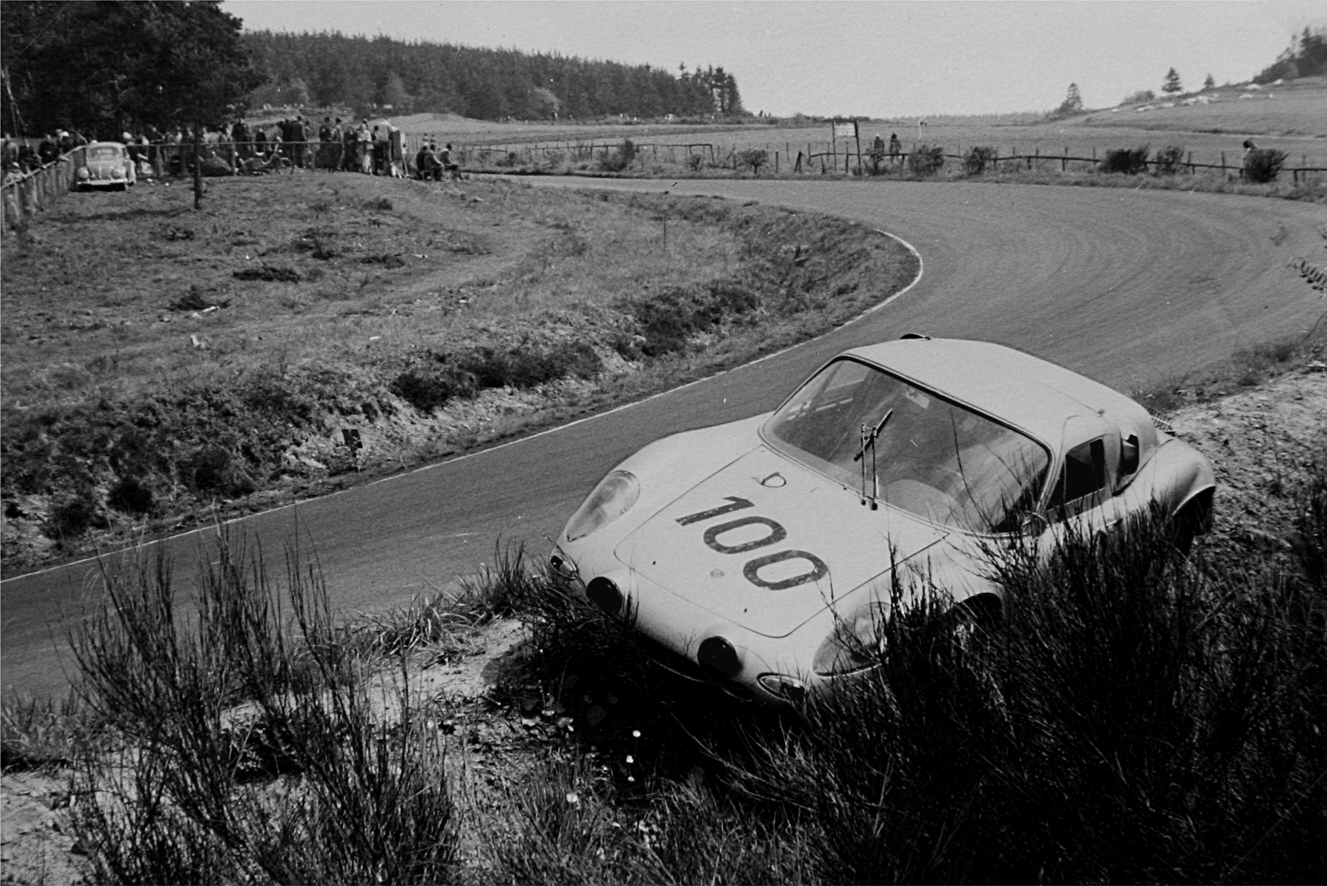 Porsche 718 GTR nach dem Unfall in der Arembergkurve, Nürburgring, beim 1000-km-Rennen, gefahren von Phil Hill. Hill hatte sich wahrscheinlich verschaltet.